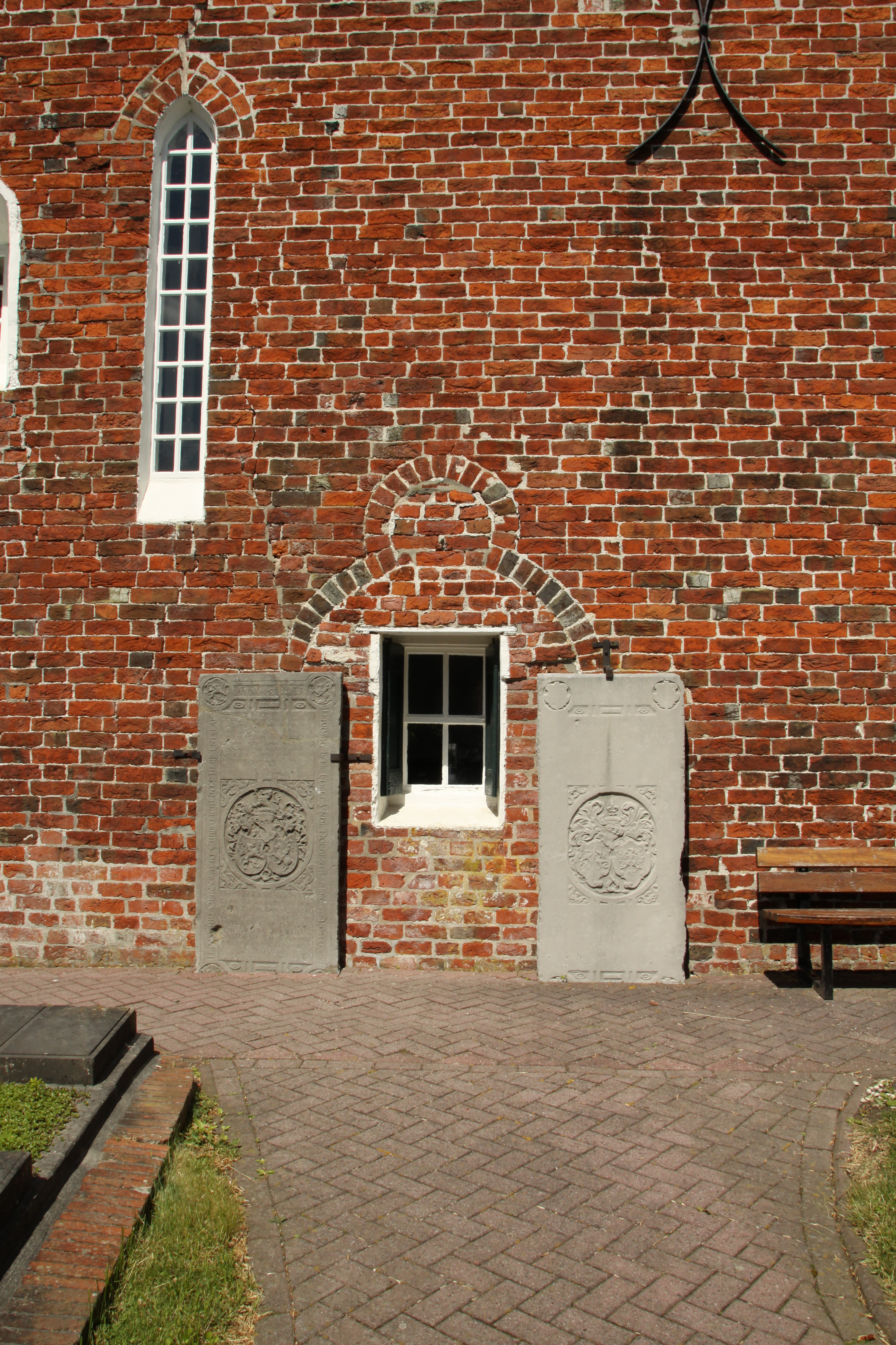 Zugemauerter Torbogen der Uplewarder Kirche